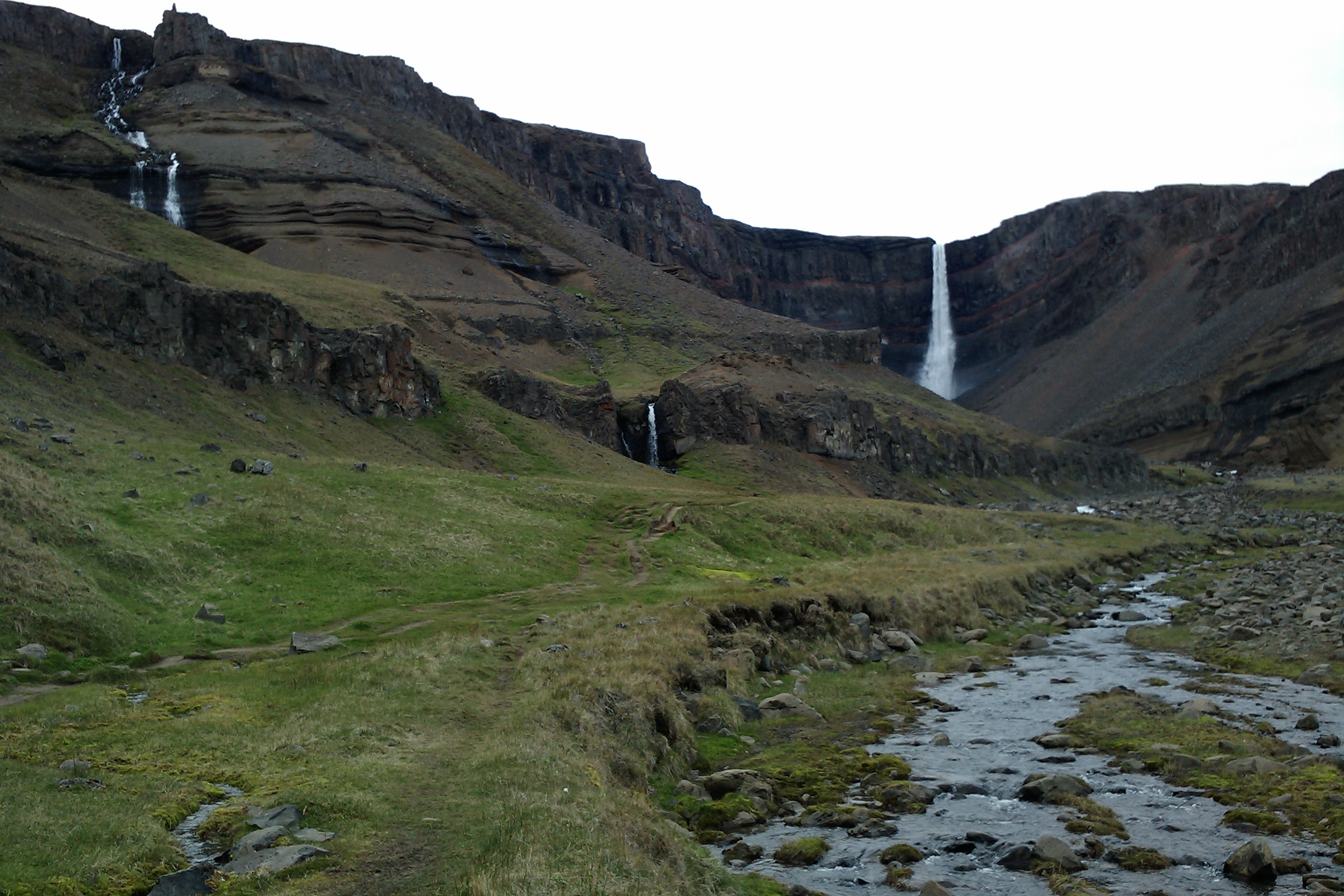 Chutes d'eau d'Hengifoss, islande